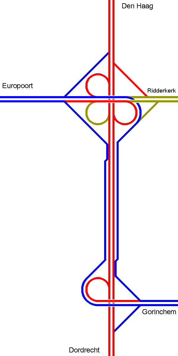 Knooppunt Ridderkerk omstreeks 1989